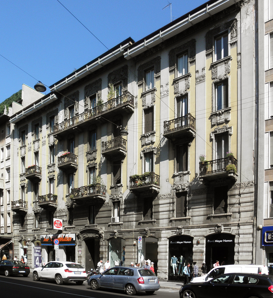 Milano, Casa Centenara in corso Buenos Aires 66, costruita nel 1907 su progetto di Giovanni Battista Bossi.Fonte: Maurizio Boriani, Corinna Morandi, Augusto Rossari, Milano contemporanea. Itinerari di architettura e di urbanistica, Maggioli Editore, 2007, p. 165. ISBN 978-88387-4147-6 Invalid ISBN.